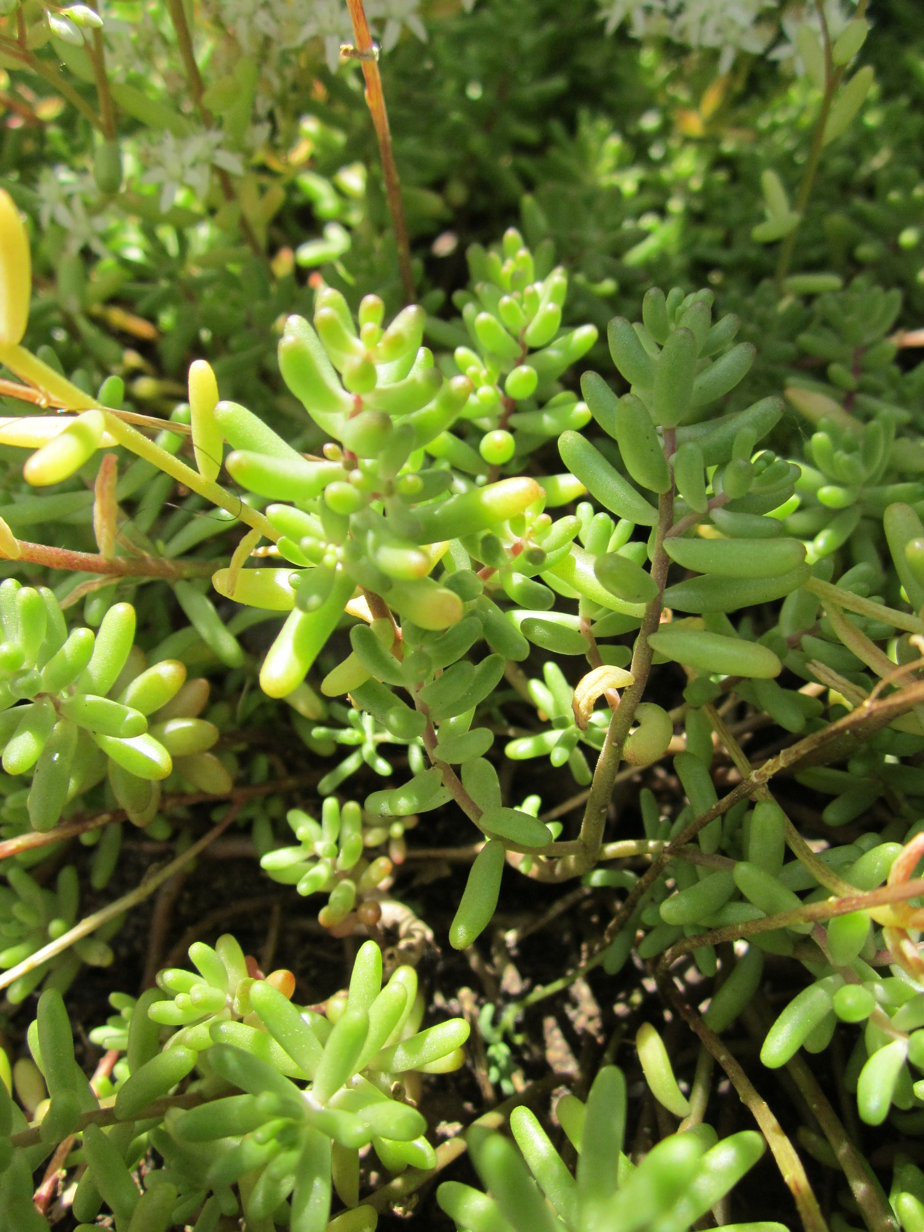 Weiße Fetthenne (Sedum album) im Schwetzinger Hardt